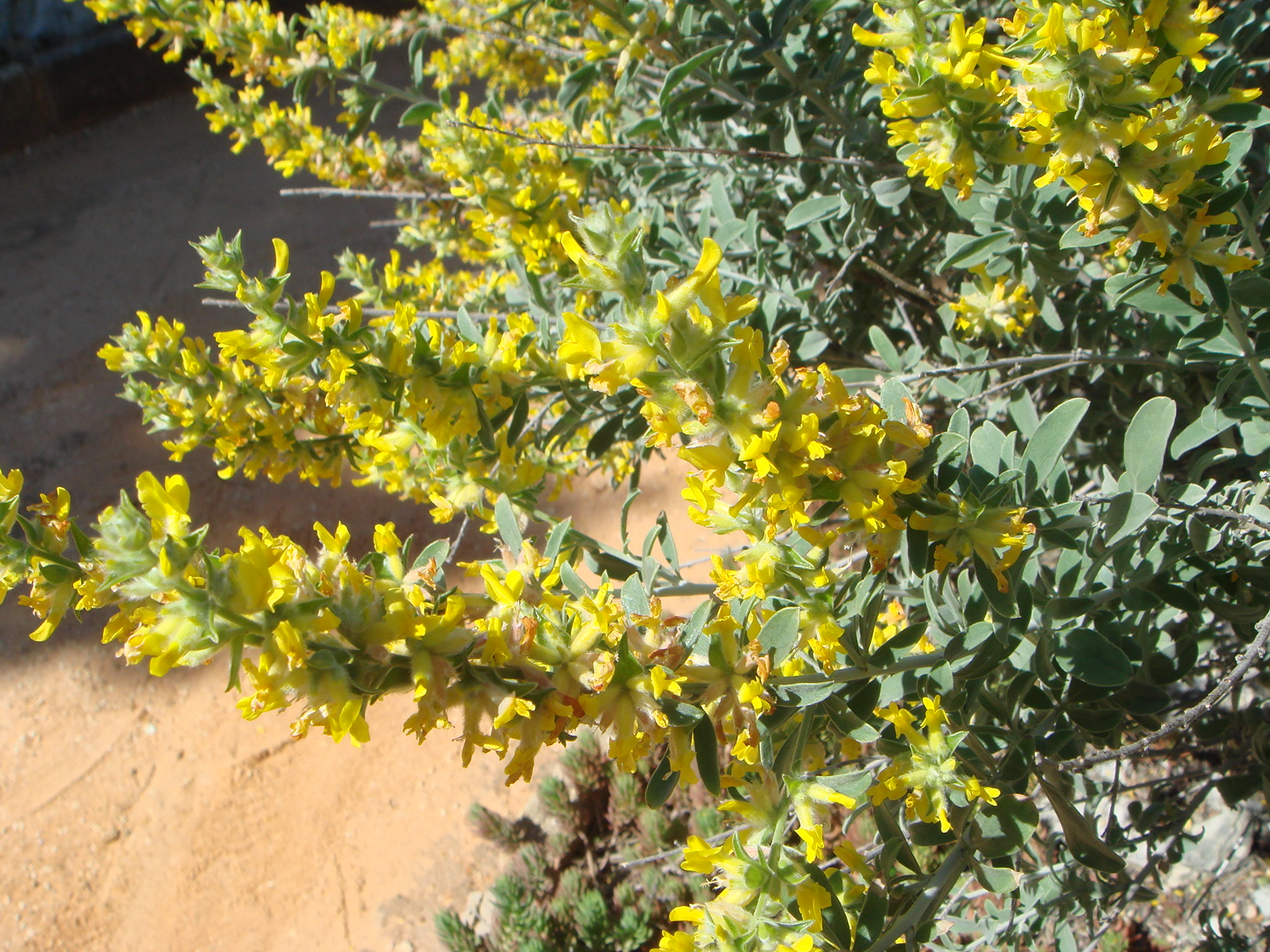 Anthyllis cytisoides L, Jardín Botánico de San Fernando, Cádiz, España